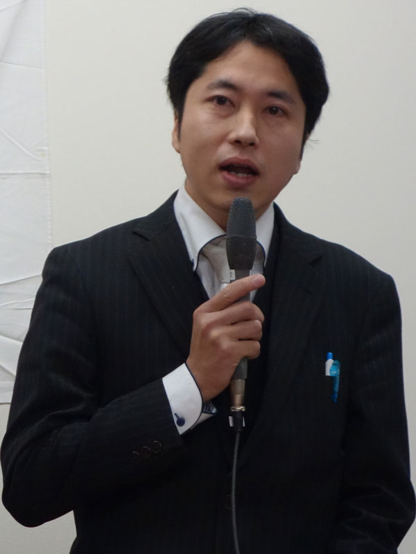 Kanetomo Takayuki at 2017